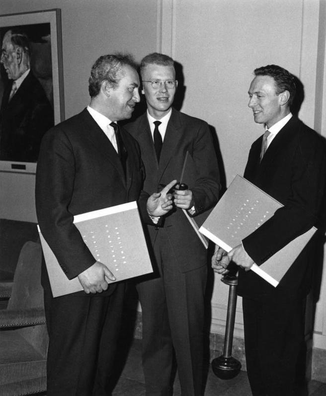 18.3.1960 West-Berlin Der "Berliner Kunstpreis - Jubiläumsstiftung 1848/1948 " für das Jahr 1960 verliehen